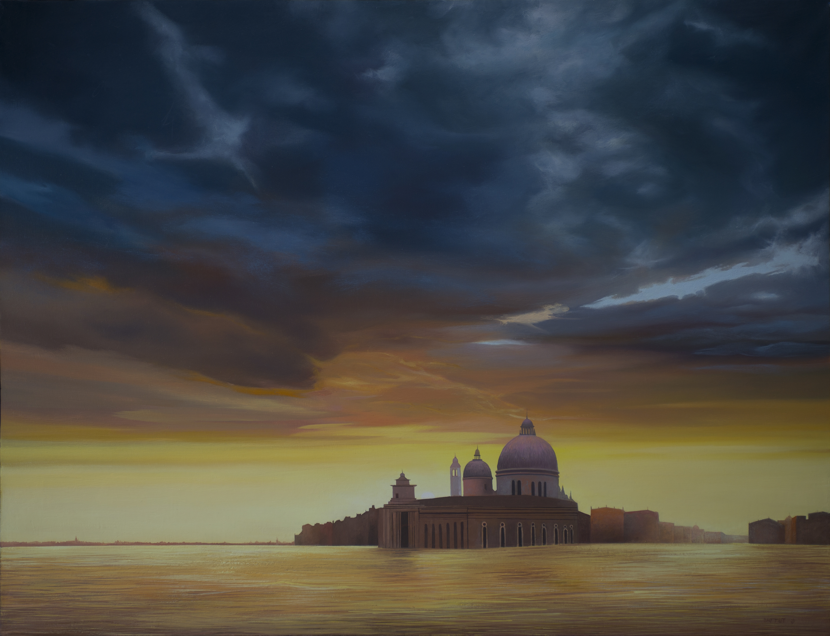 "Venise" 89x116 cm